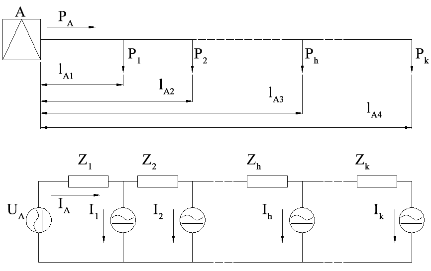 autore: Len zuò descrizione: schema di linea monofase a sblazo con più carichi e relativo schema equivalente